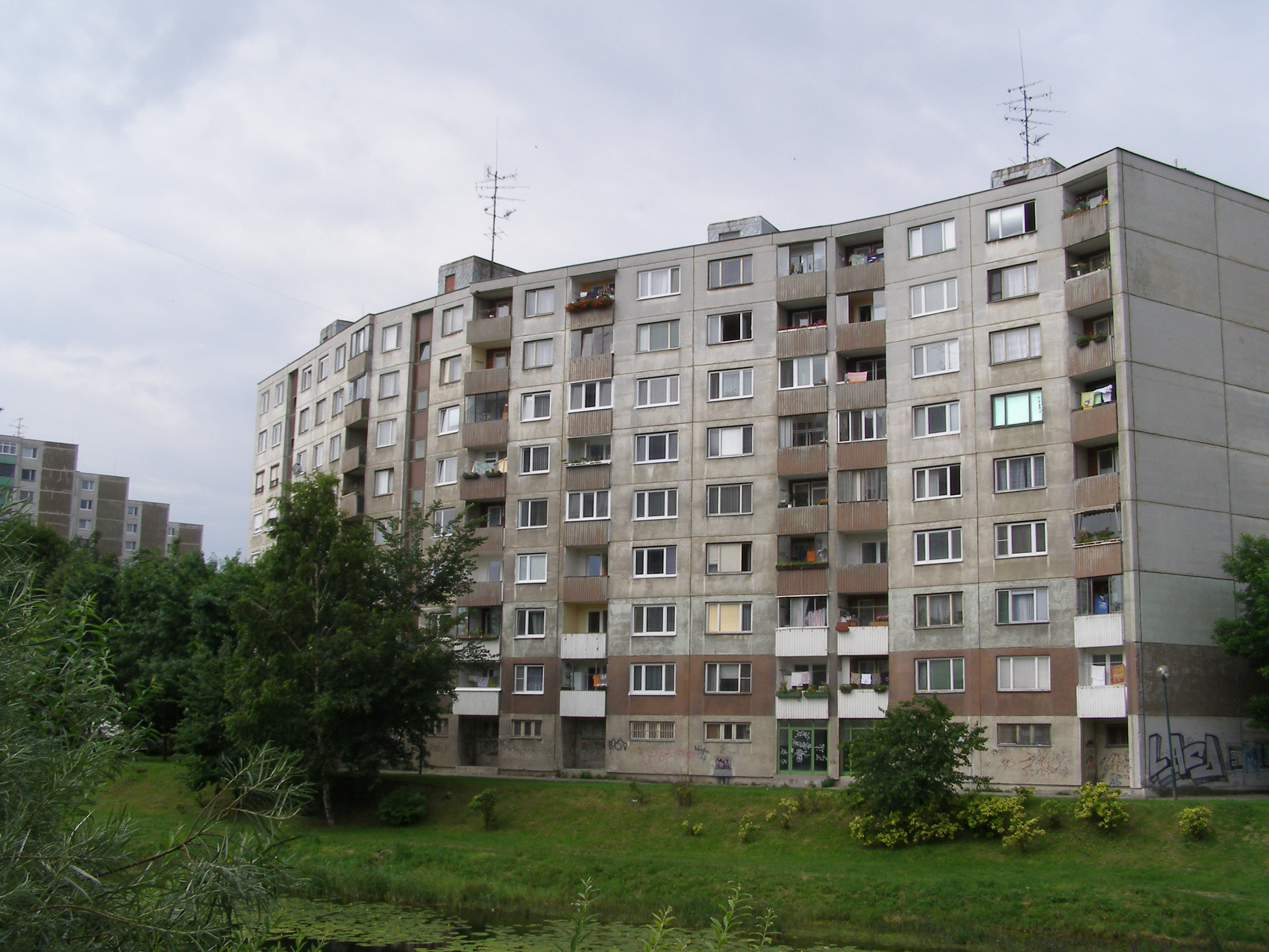 Topoľčianska street, Petržalka, Bratislava